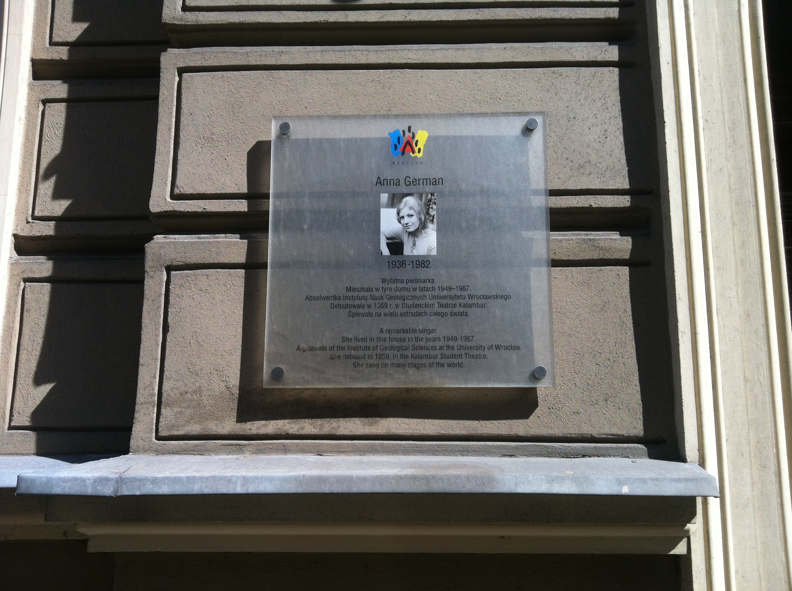 Tablica pamiątkowa przy ul. Trzebnickiej 5 Wrocław